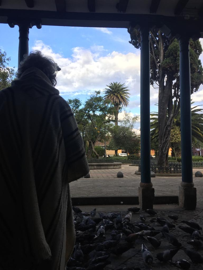 Durante las últimas décadas, Eudoxia admira las palomas frente al Parque de San Sebastian